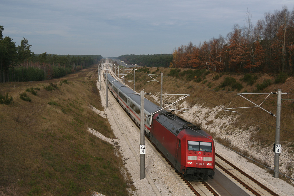 Eine Lokomotive der Baureihe 101 mit IC 2411 auf der NBS Nürnberg–Ingolstadt bei Allersberg.